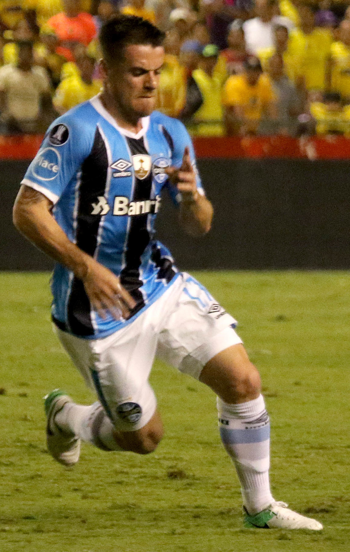 Guayaquil 25 de octubre del 2017 (Andes).- En el estadio Monumental, Barcelona se enfrenta a Gremio de Porto Alegre en el partido de ida por la semifinal de la Copa Libertadores 2017 Foto:Andes/César Muñoz